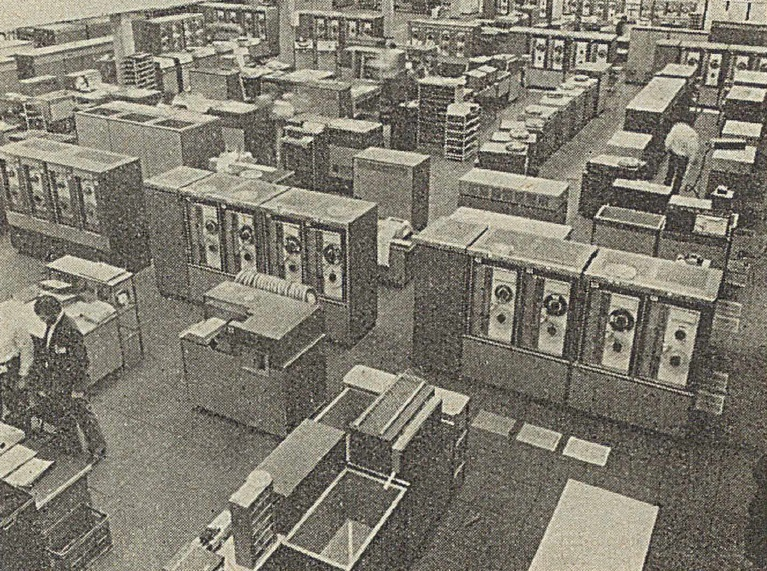 ICL Bracknell, hala